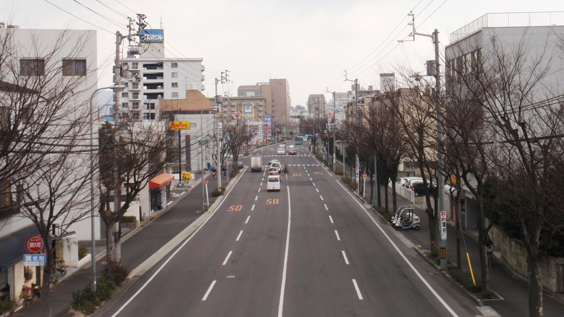 香川県高松市中心部から西へ伸びる高松市道五番町西宝線の風景。昭和町の歩道橋上から。